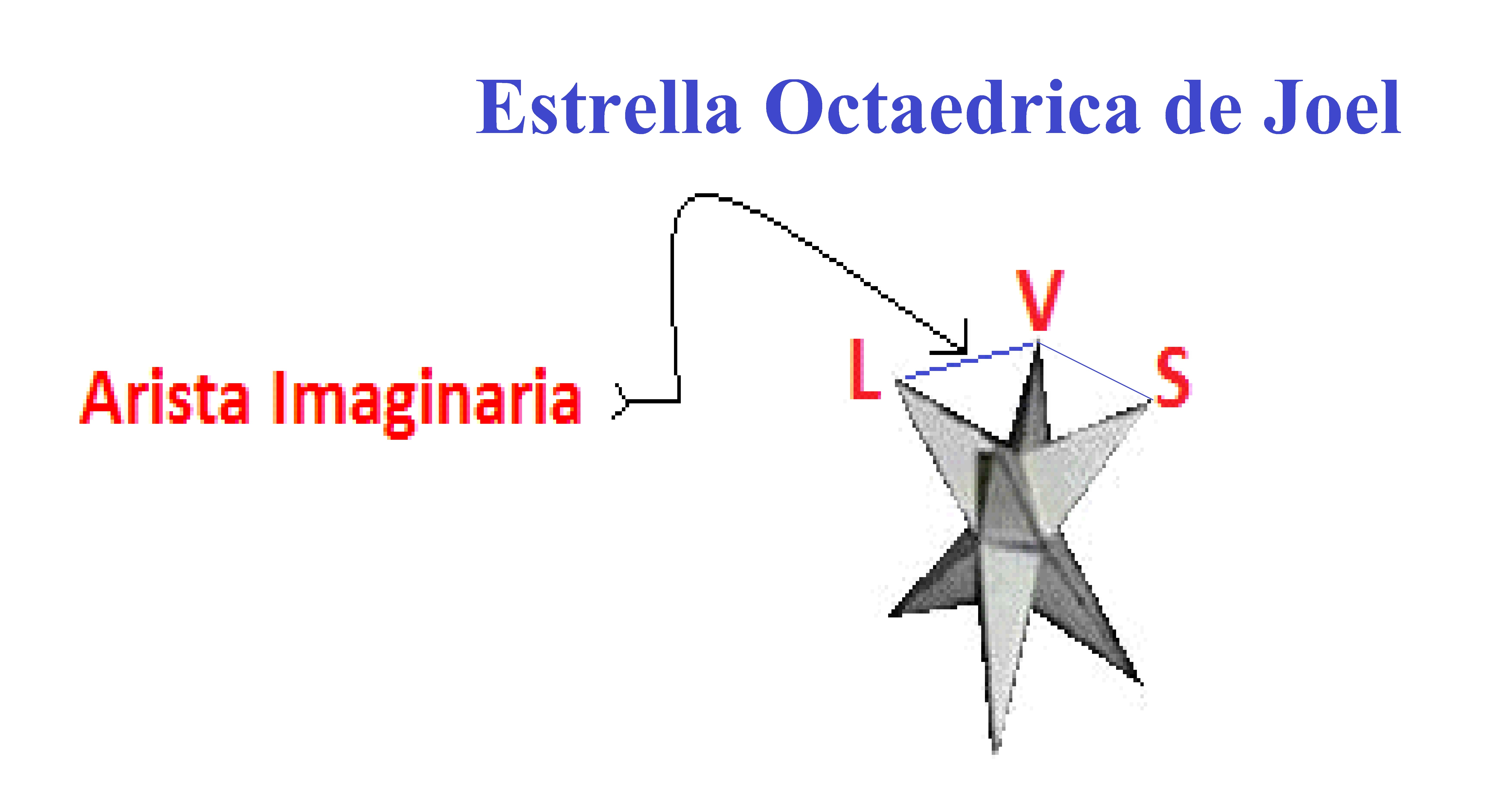 La estrella octaédrica de Joel posee 24 caras triangulares interiores que posee forma de triángulo isósceles. Ostenta 6 vértices intermedio y 8 vértices exteriores, para un total de 14 vértices. Además posee 24 aristas exteriores y 12 aristas intermedias, para un total de 36 aristas. La estrella octaédrica de Joel pertenece al conjunto de los poliedros triangulares , que ocupan la posición #11 (L=11, C=2L+2, A=3L+3, V=L+3) de acuerdo a las secuencias triangulares del Dominicano Jose Joel Leonardo. Si unimos mediante aristas imaginarias el conjunto de los vértices exteriores que posee la estrella octaédrica de Joel, tendremos como resultado un hexaedro regular convexo imaginario. Observemos: La estrella octaédrica de Joel representa la sexta estelación del octaedro.